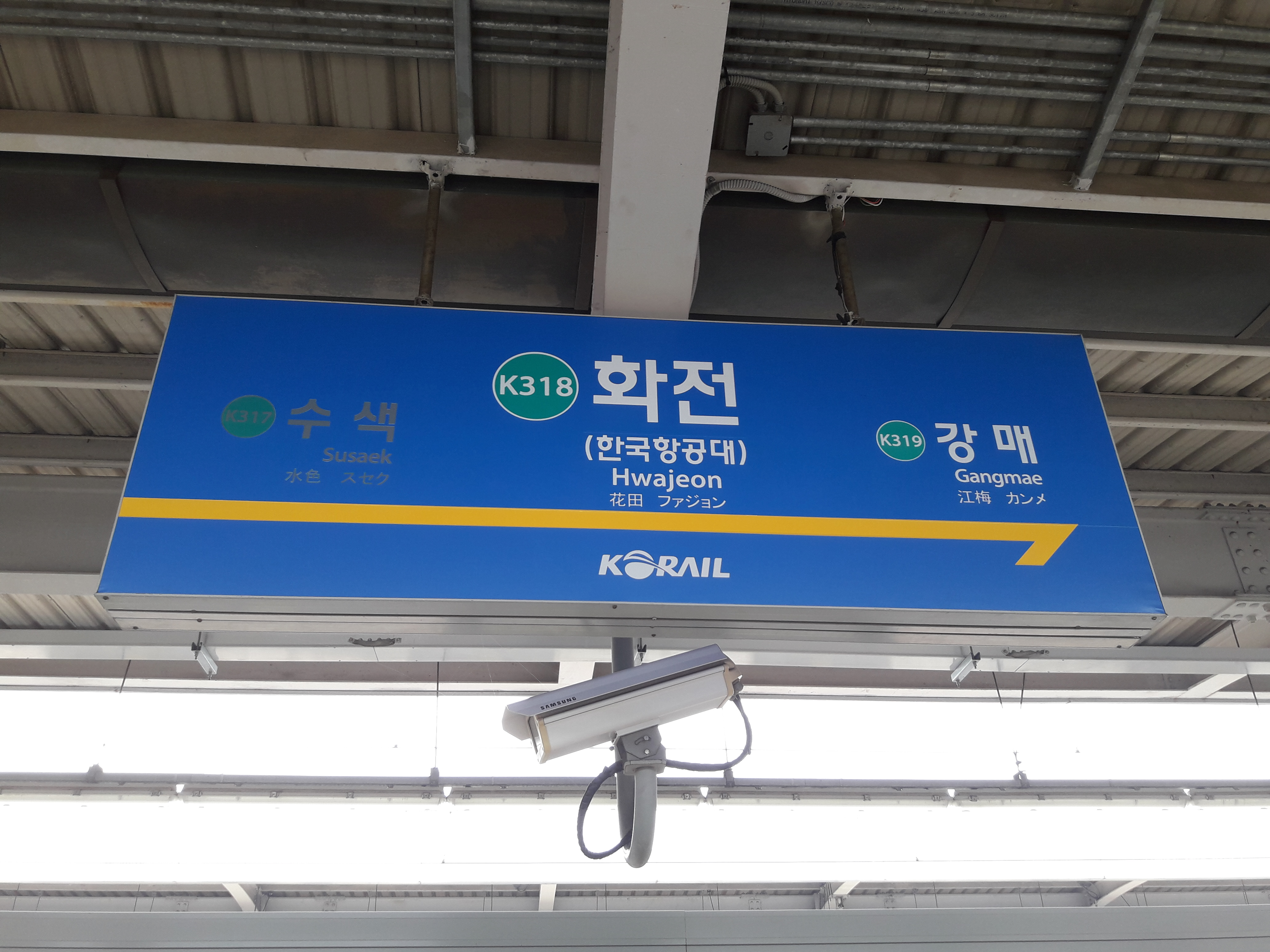 역명판